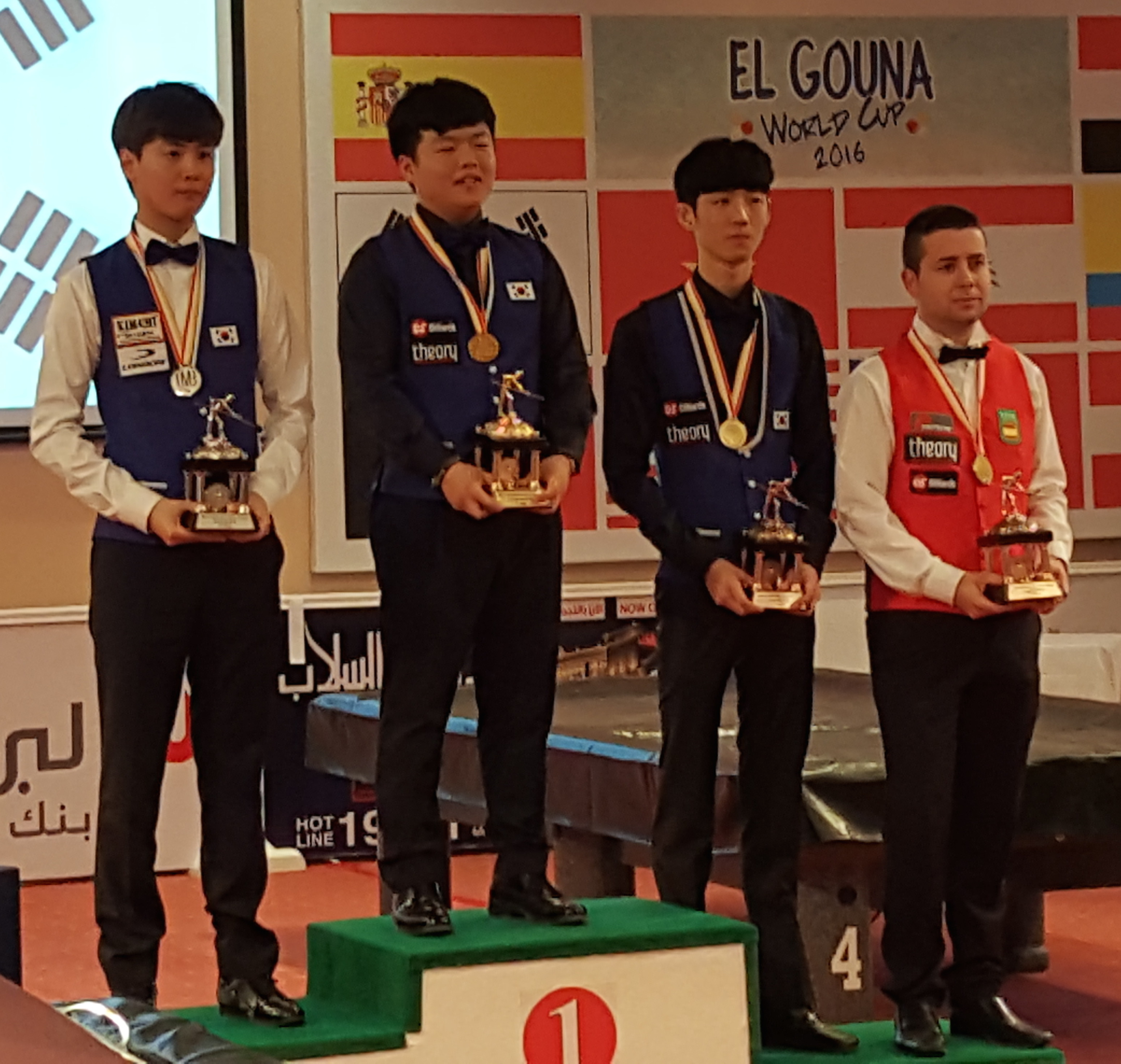 Dreiband-Weltmeisterschaft der Junioren 2016 in el-Guna, Ägypten. Siegerehrung